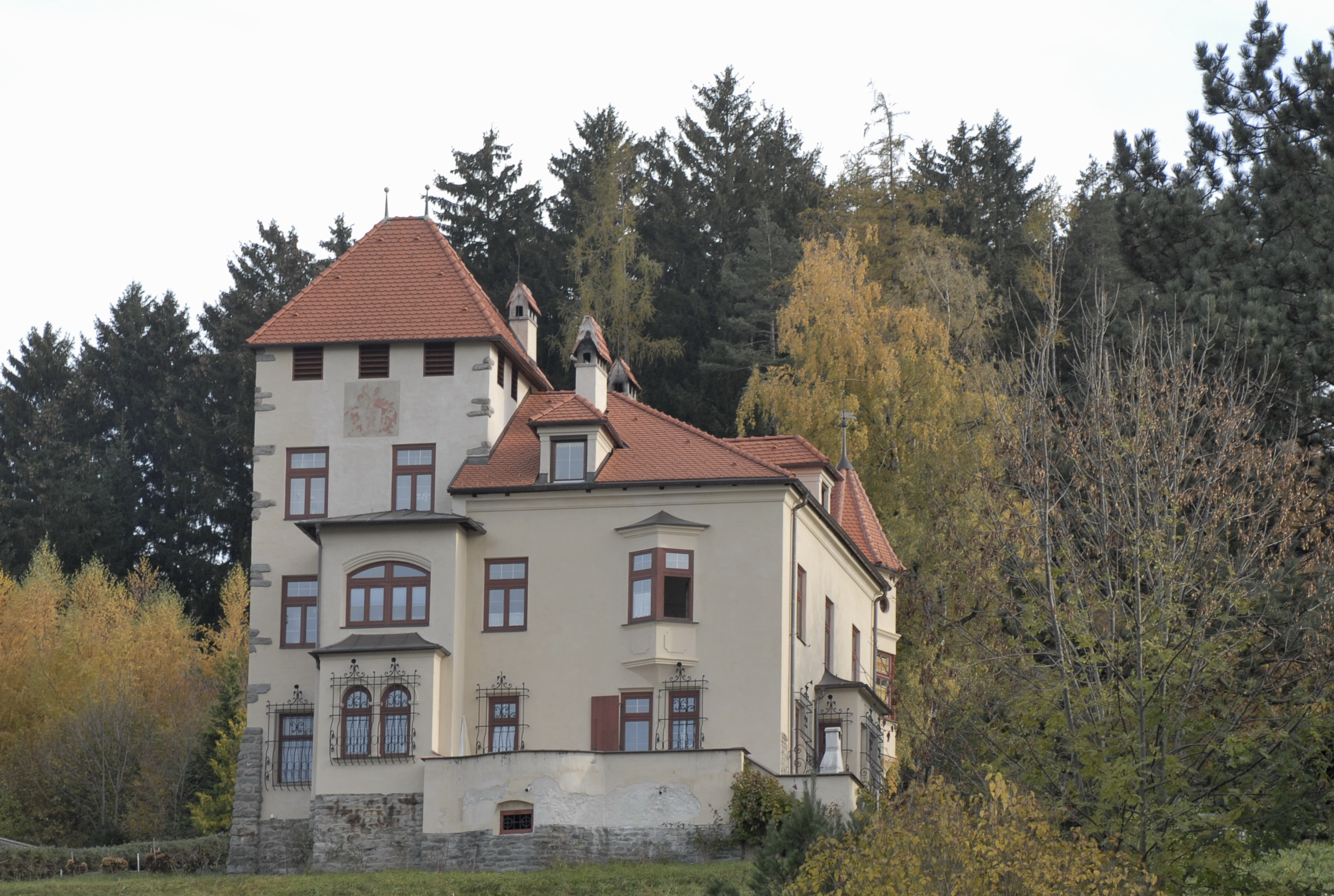 Aldrans, Schrattenburg, Schullern-Schlössl